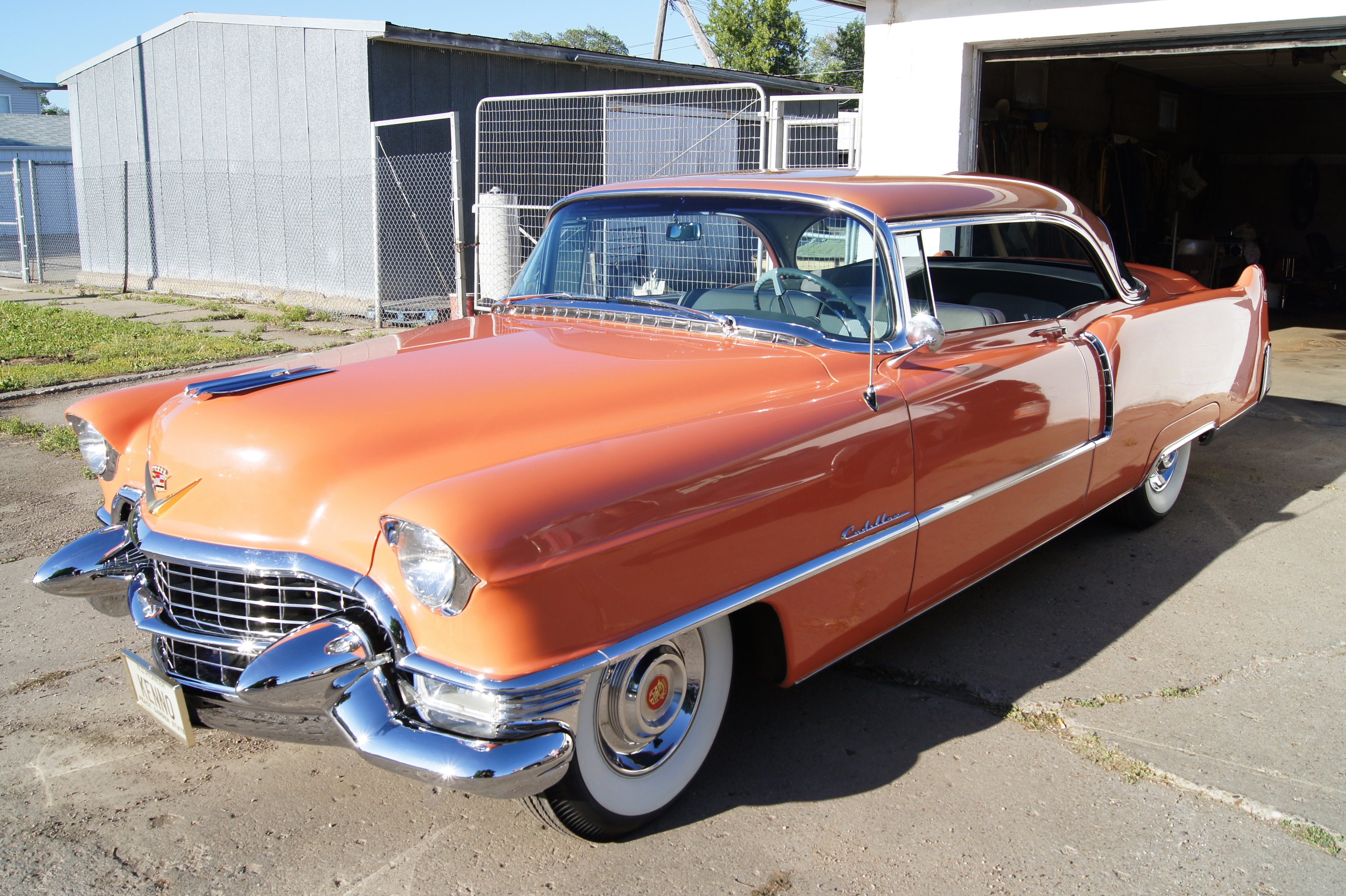 1955 Cadillac Series 62